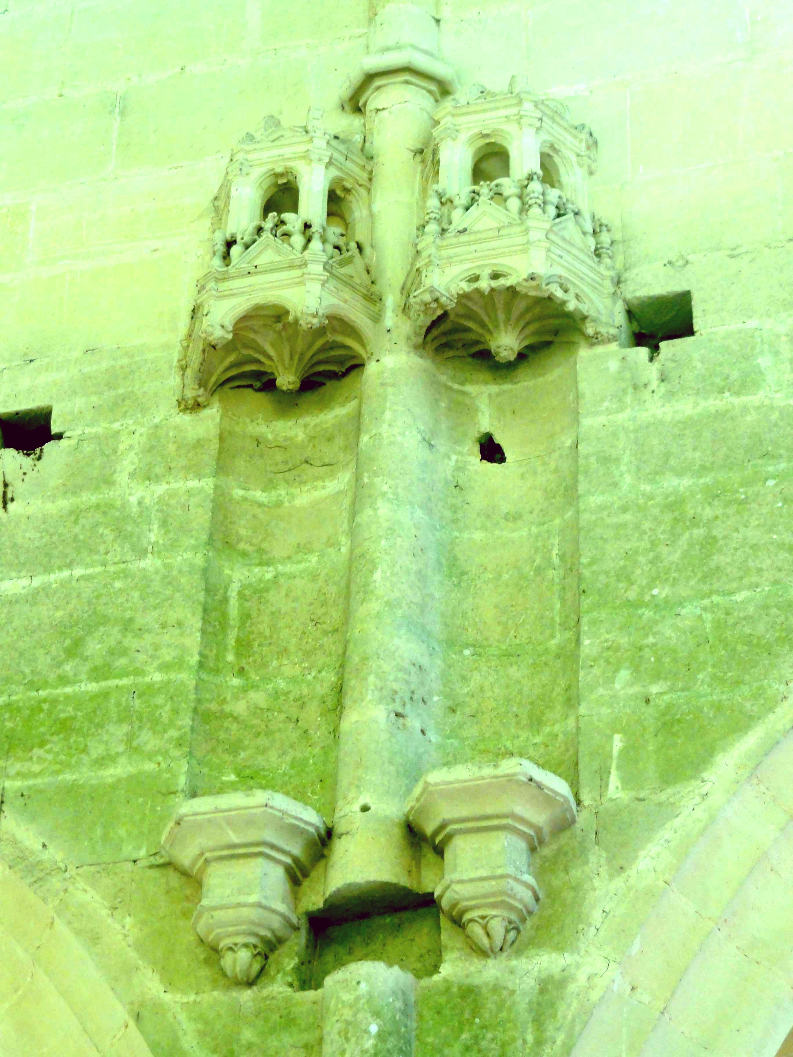 Intérieur de l'église - voir titre.